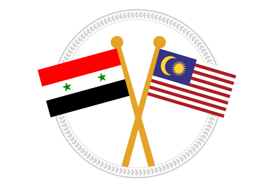 شعار السفارة